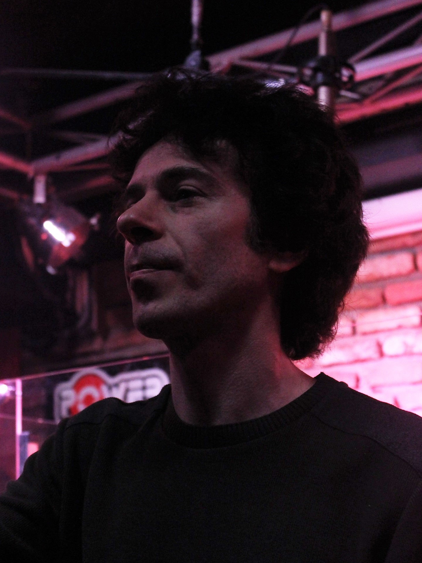 Kurban'dan Deniz Yılmaz, Ankara konserinden.